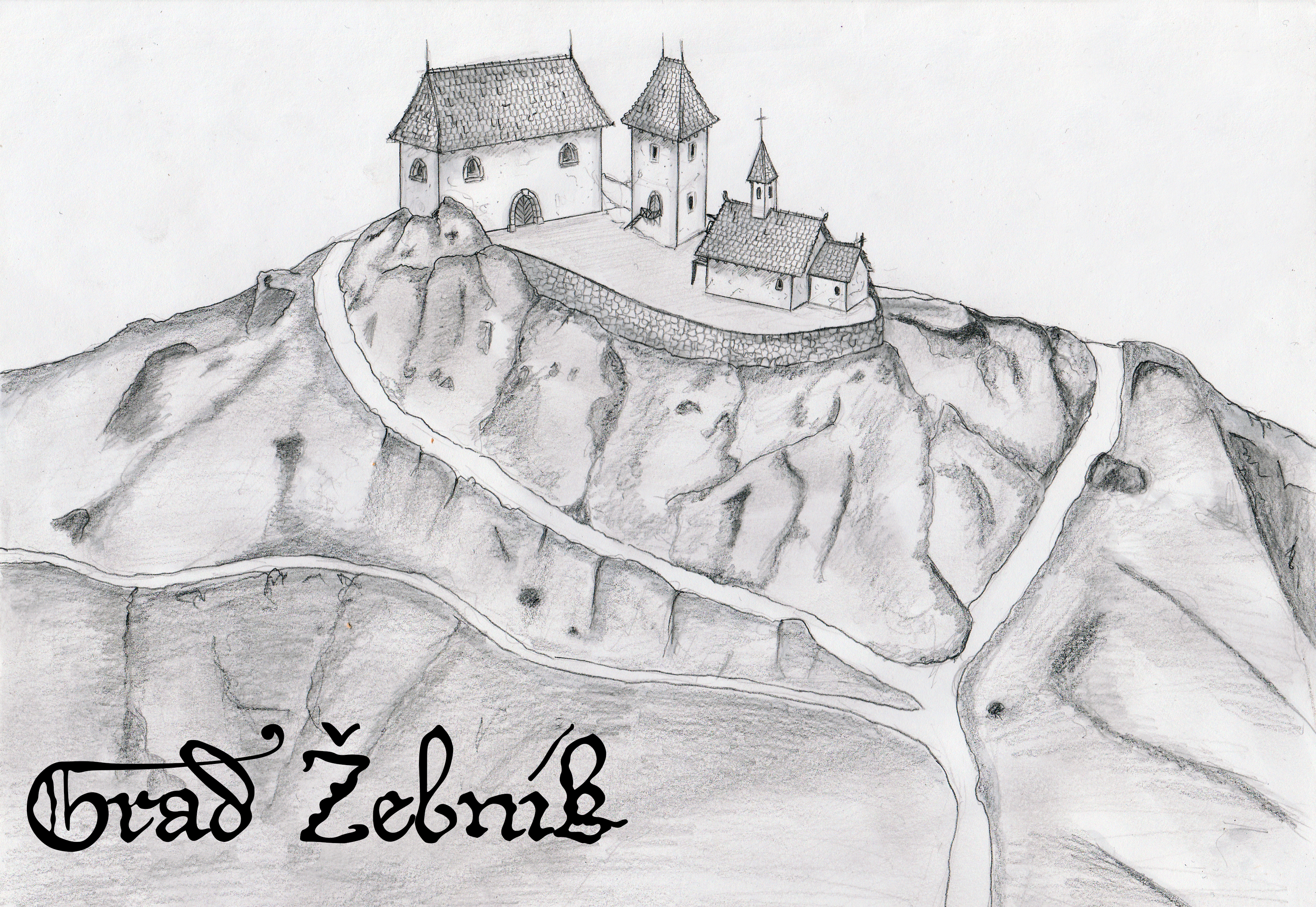 Poskus rekonstrukcije gradu Žebnik pri Radečah